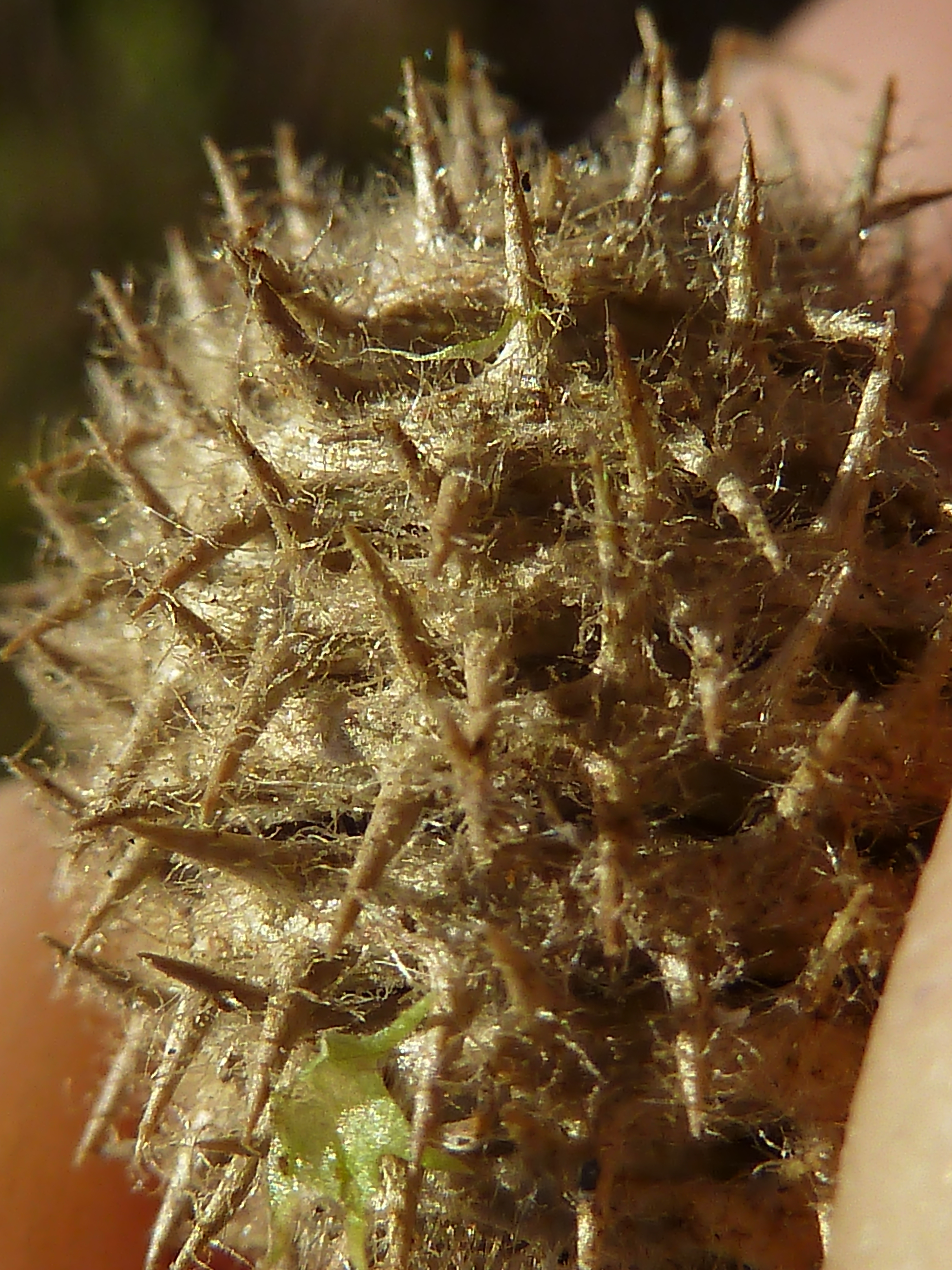 Medicago intertexta (Carretón pinchoso) - Fruto helicoidal ovoide submaduro suelto: detalle de las espinas y del indumento peloso. - Camino de la Azarbe de Patricio, Albatera (Provincia de Alicante, España).